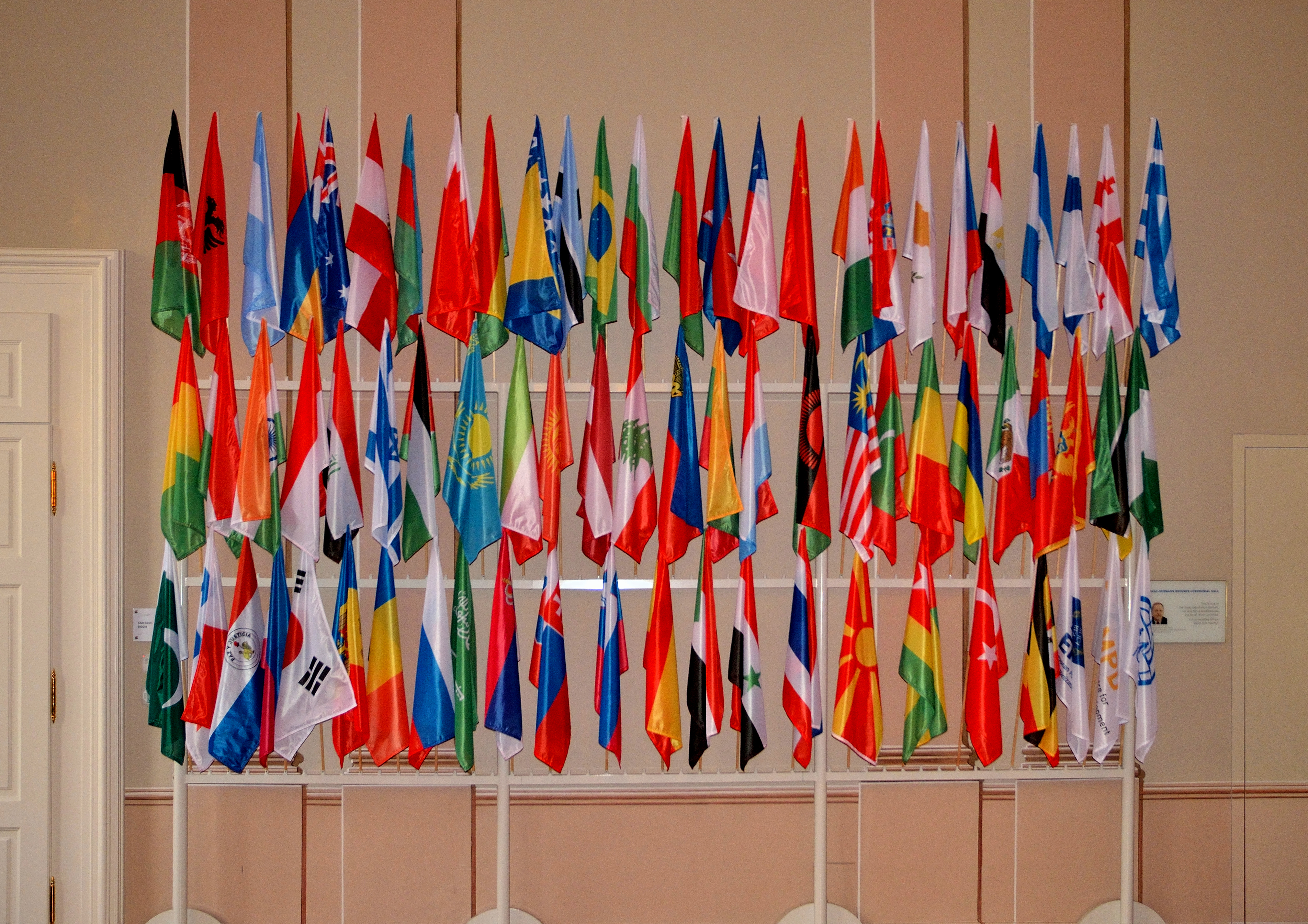 Flaggen aller Mitgliedsstaaten der Internationalen Antikorruptionsakademie in der Franz-Hermann Bruener Ceremonial Hall im Palais Kaunitz, Laxenburg.